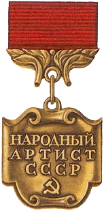 Знак «Народный артист СССР». Изображение с удостоверения к знаку.